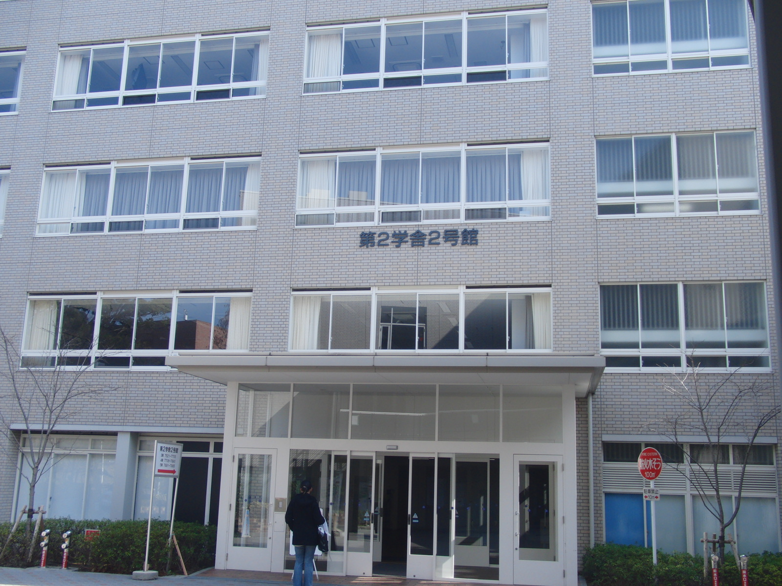 関西大学第2学舎2号館を撮影